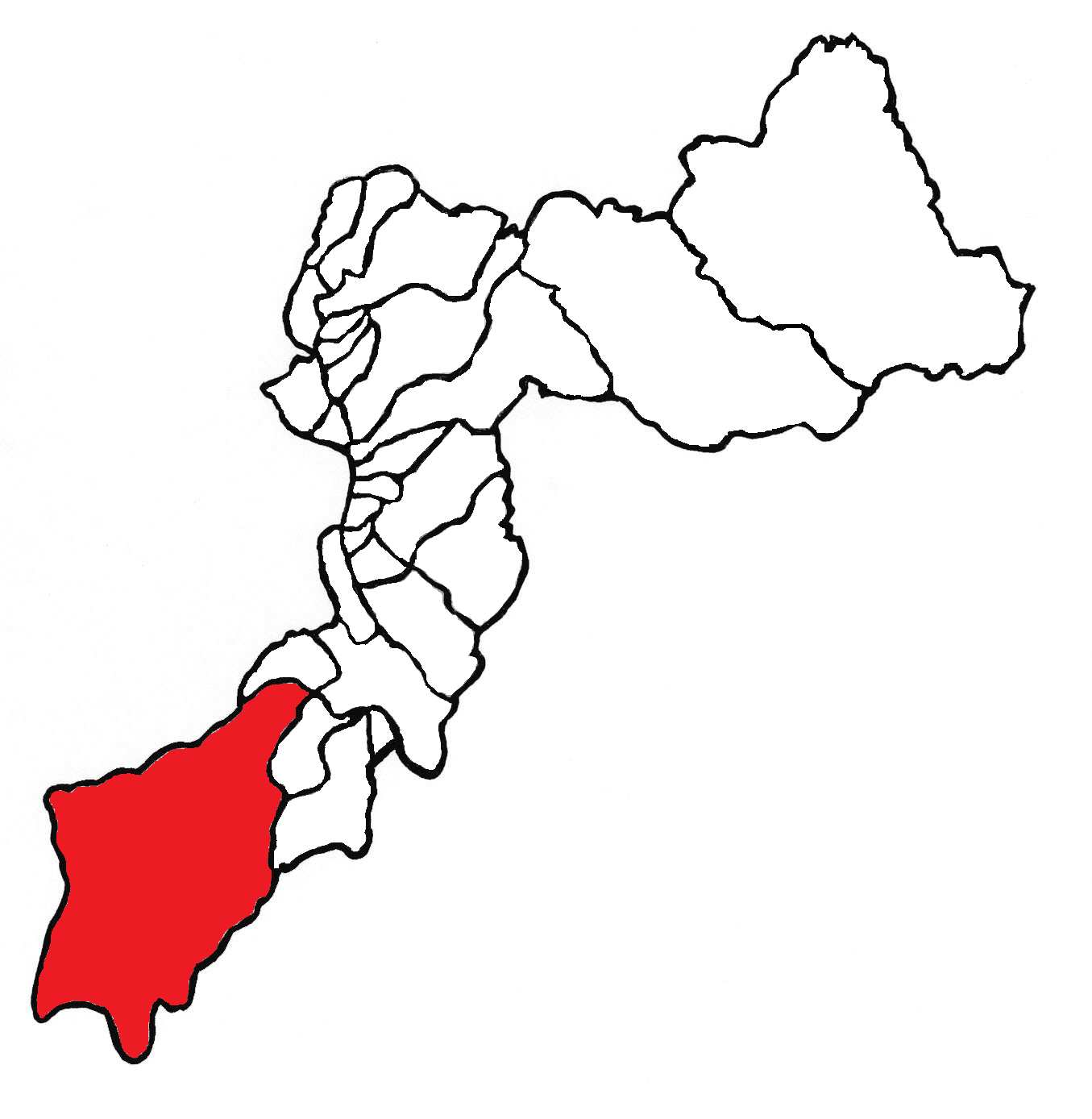 Ubicación del distrito en la provincia de Huancayo, departamento de Junín, Perú